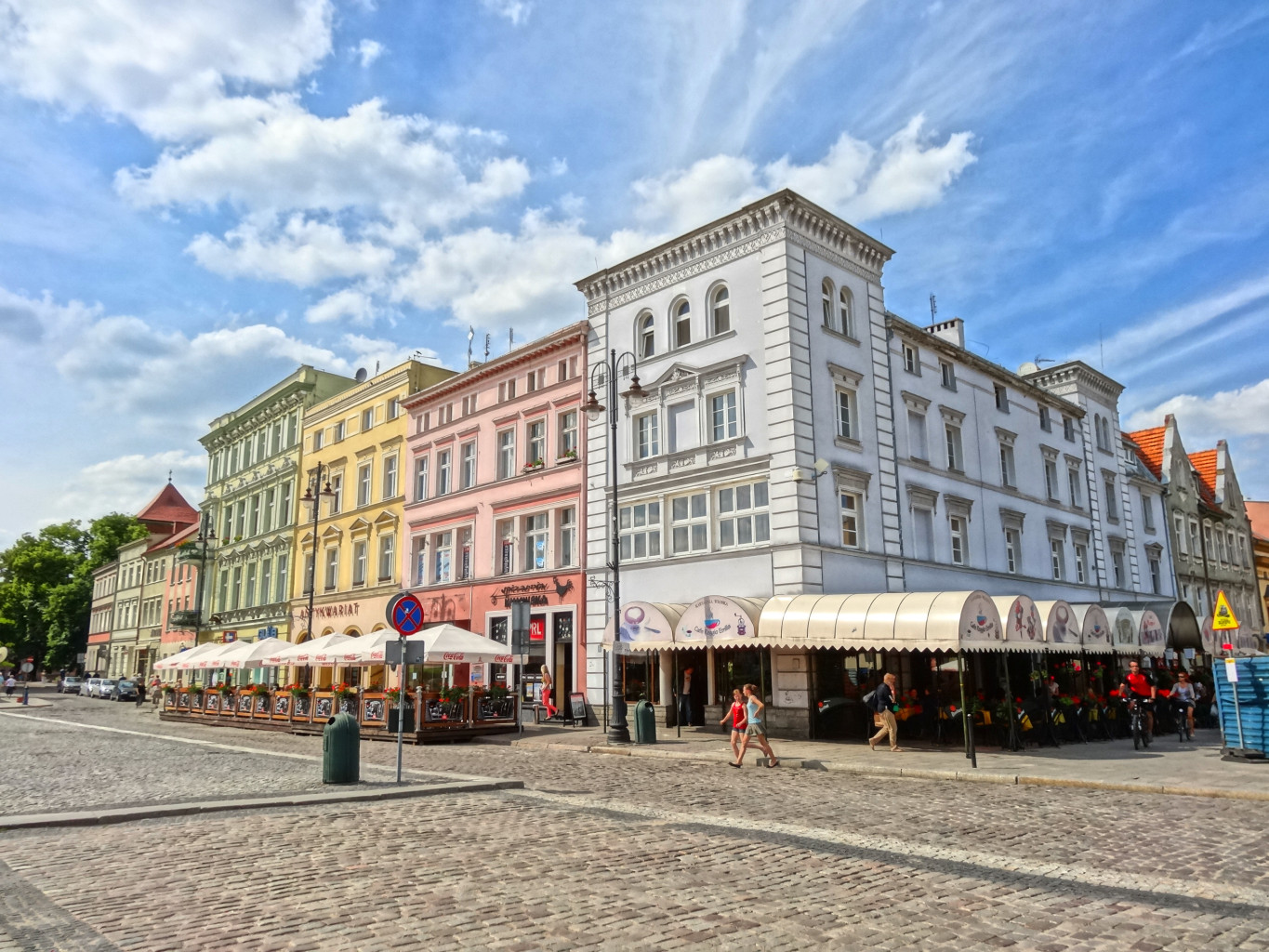 Północna pierzeja Starego Rynku w Bydgoszczy